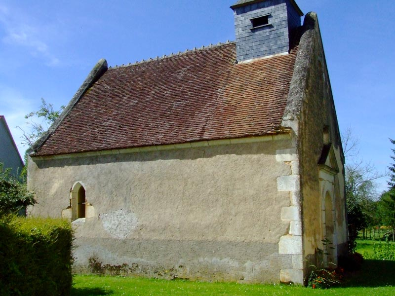 Chapelle Sainte Camille de Chevigny sur la commune d'Étais-la-Sauvin (Yonne)